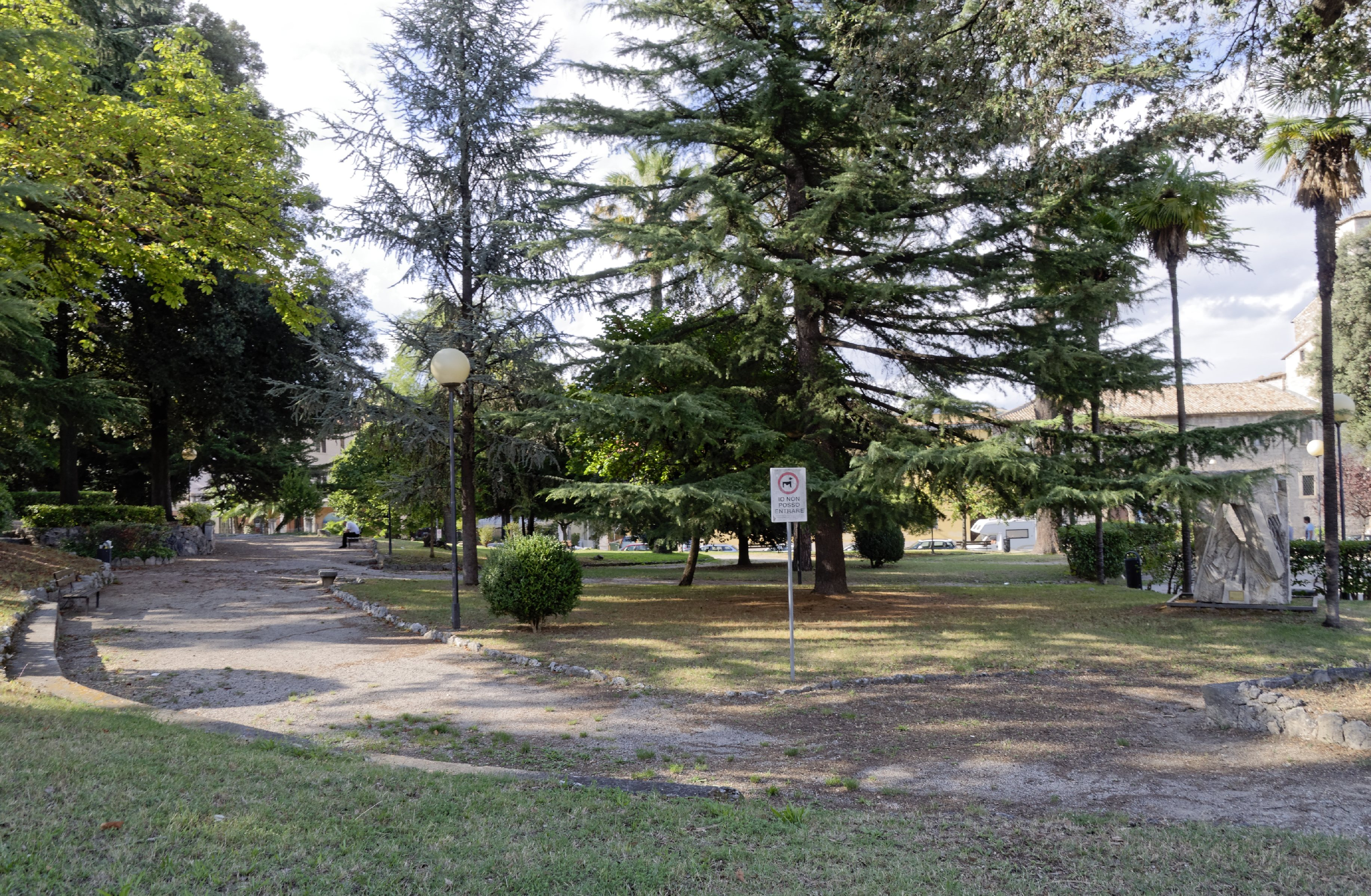 Ascoli Piceno 2015 Dieses Foto entstand in Zusammenarbeit mit Stadtbesichtigungen.de Die Seiten Stadtbesichtigungen.de, der dazugehörige Reise Blog sowie die Facebookseite: Stadtbesichtigungen Rom dürfen dieses Bild für Ihre Veröffentlichungen ohne den Hinweis auf Wikipedia, Commons bzw der Lizenz verwenden. Die Verantwortlichen habe von mir (Ra Boe) die Originaldaten zur freien Verfügung übermittelt bekommen.